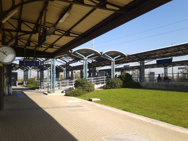 Ferrovia Verona-Bologna vista dalla tettoia della stazione di Mirandola. Fino al 2008 i binari 1-2 passavano dove ora è presente il prato, mentre gli attuali 2 binari corrispondo ai vecchi binari 3-4